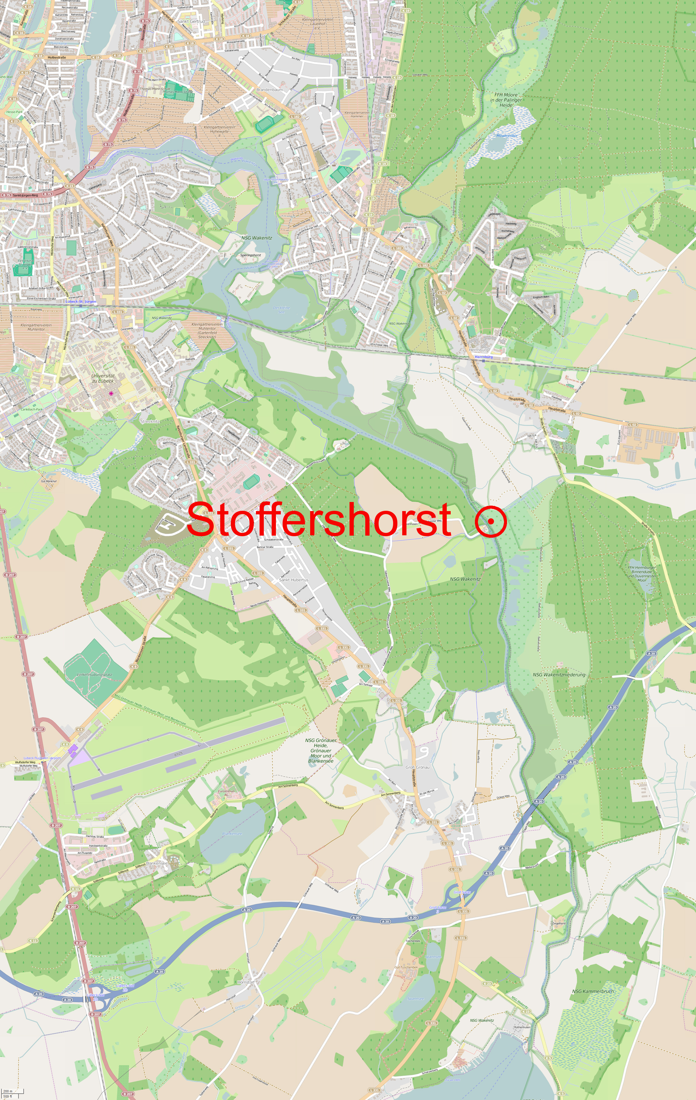 Die Lage des Wakenitzhorsts Stoffershorst